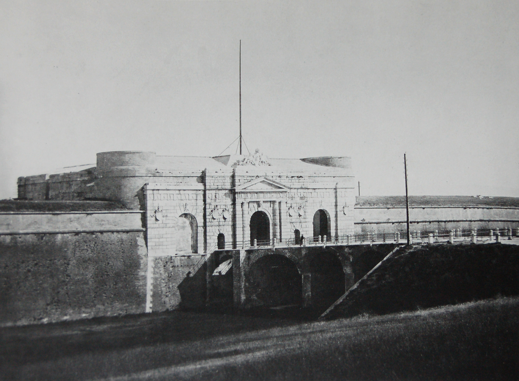 Porta Nuova a Verona. Foto di Moritz Lotze (1809-1890).